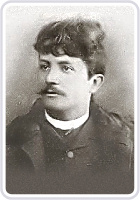 Giggi Zanazzo (1860-1911), Italian poet